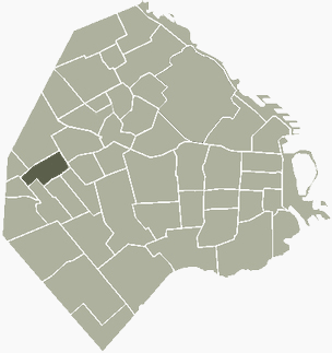 Barrio de Monte Castro